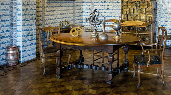 Паркет з геометричним малюнком, Морський кабінет.